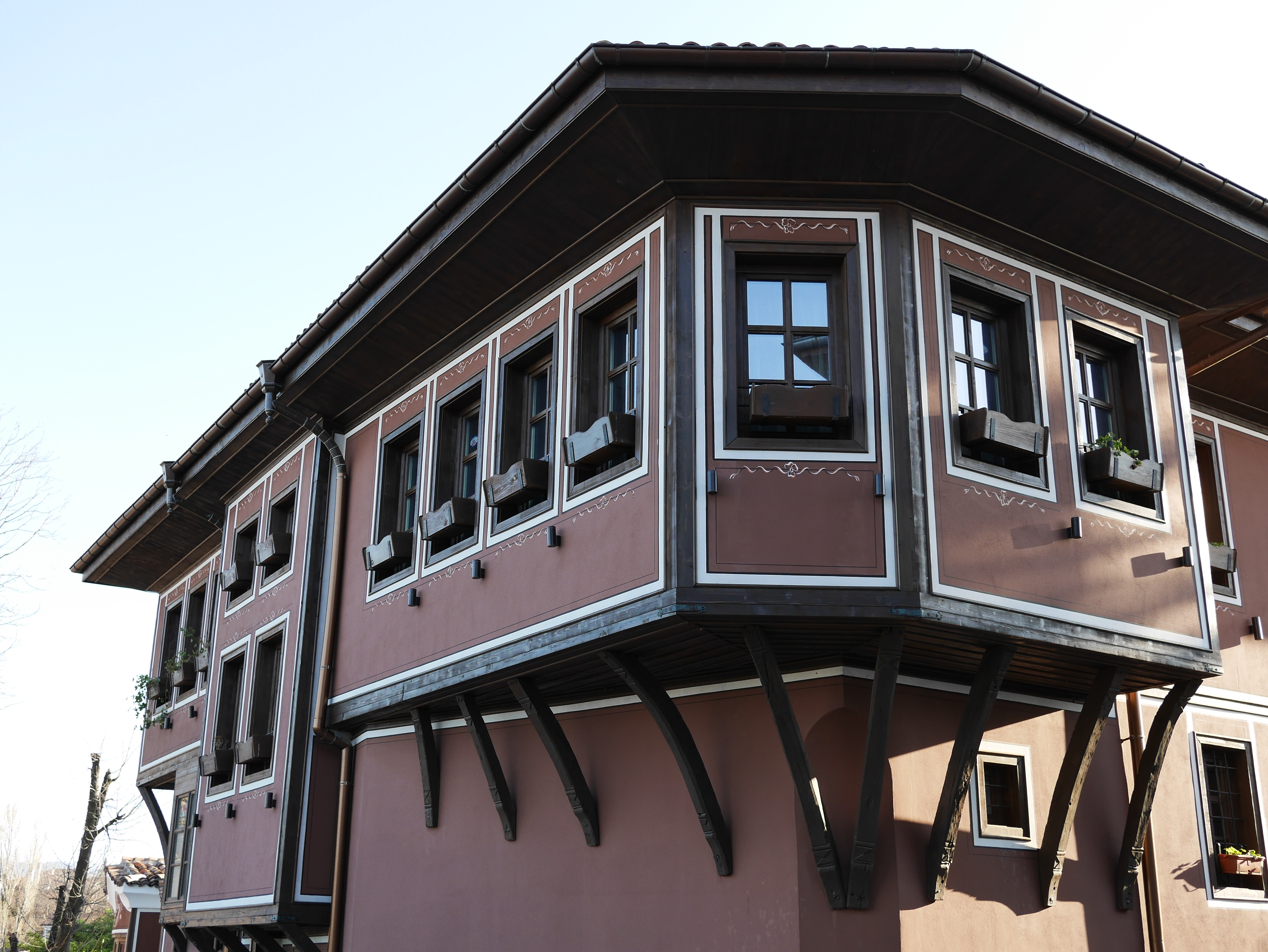 АИР Старинен Пловдив